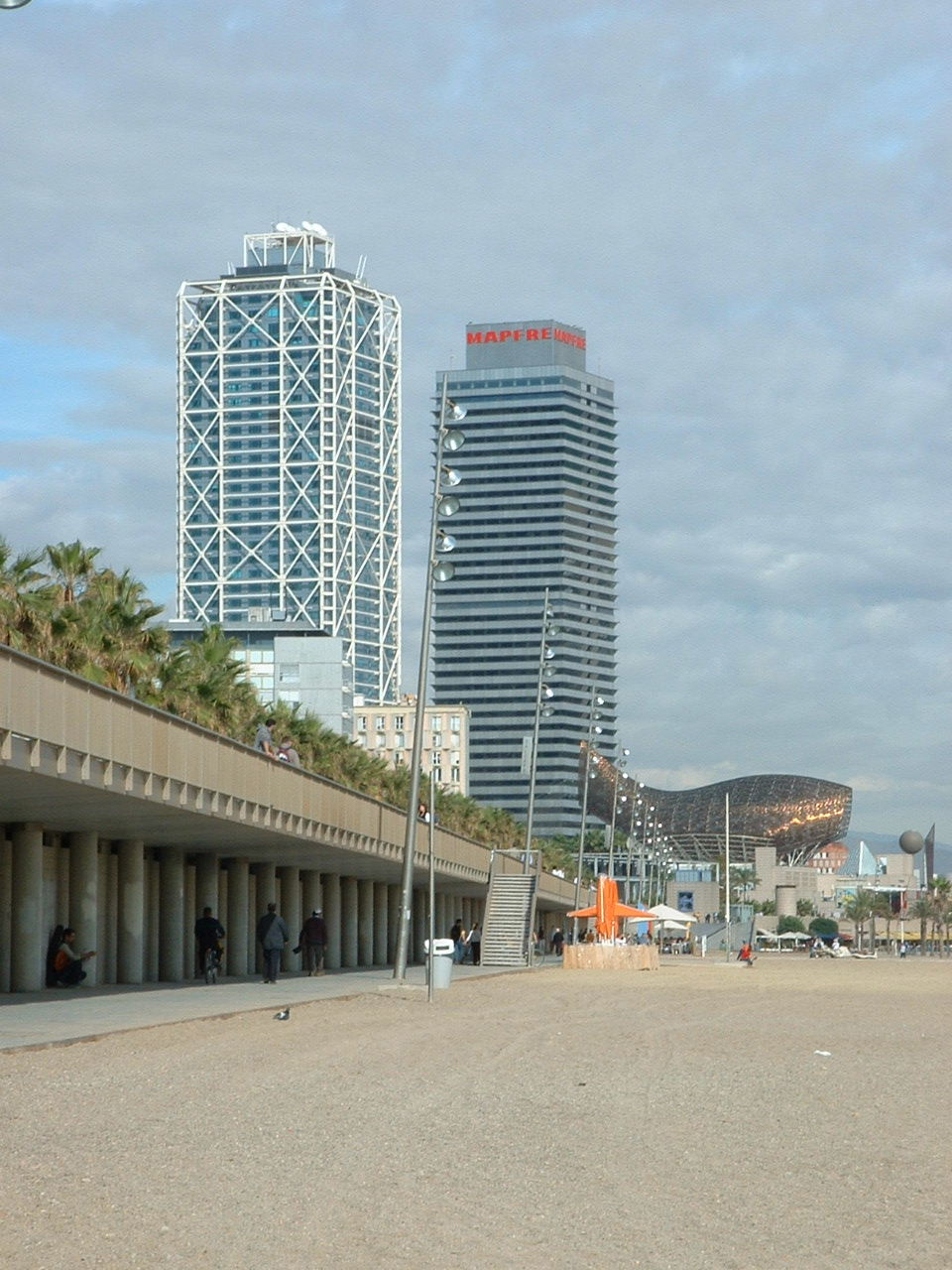 Taken Oct 2004